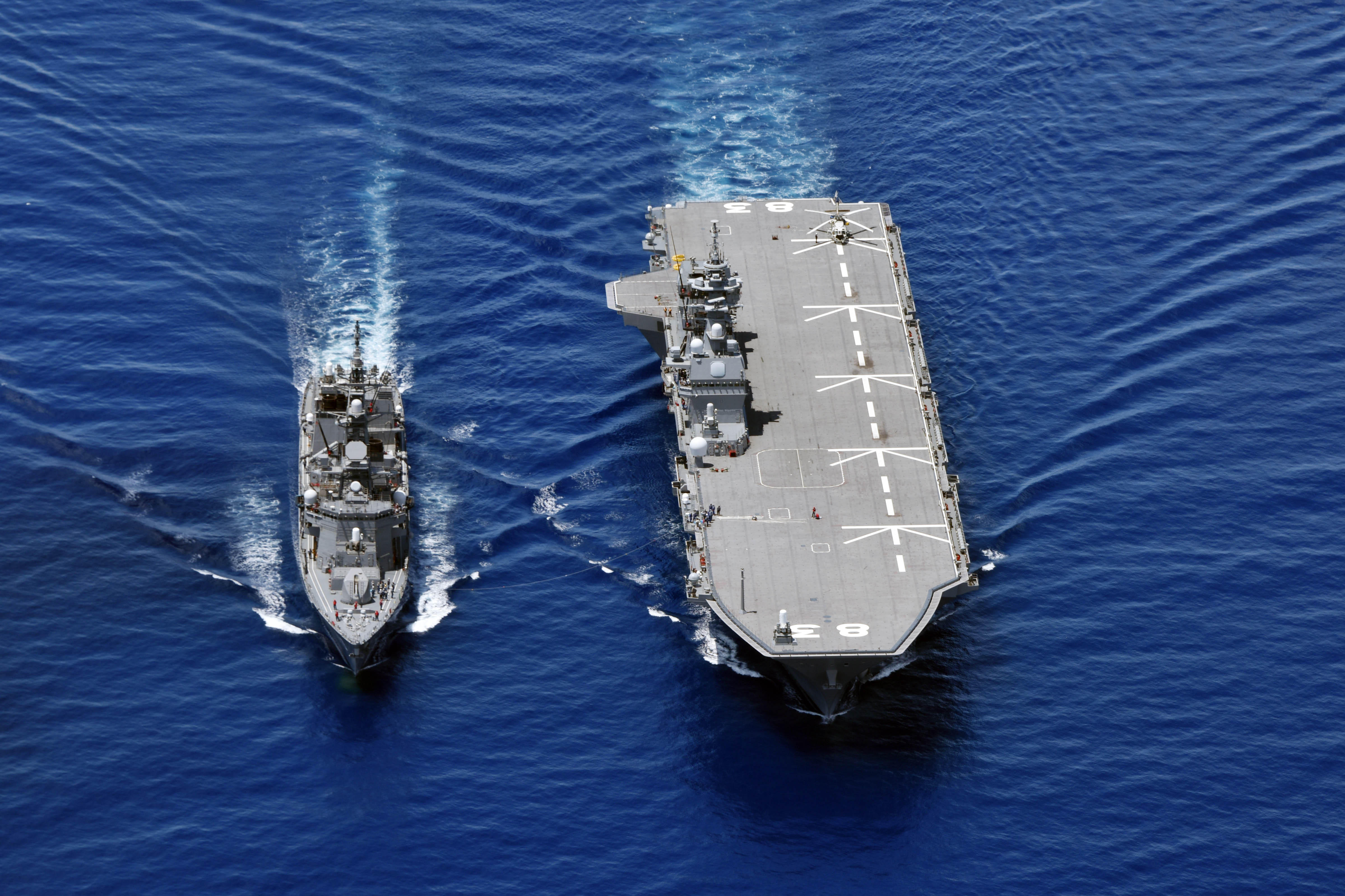 DDH-183 いずも と DD-113 さざなみ